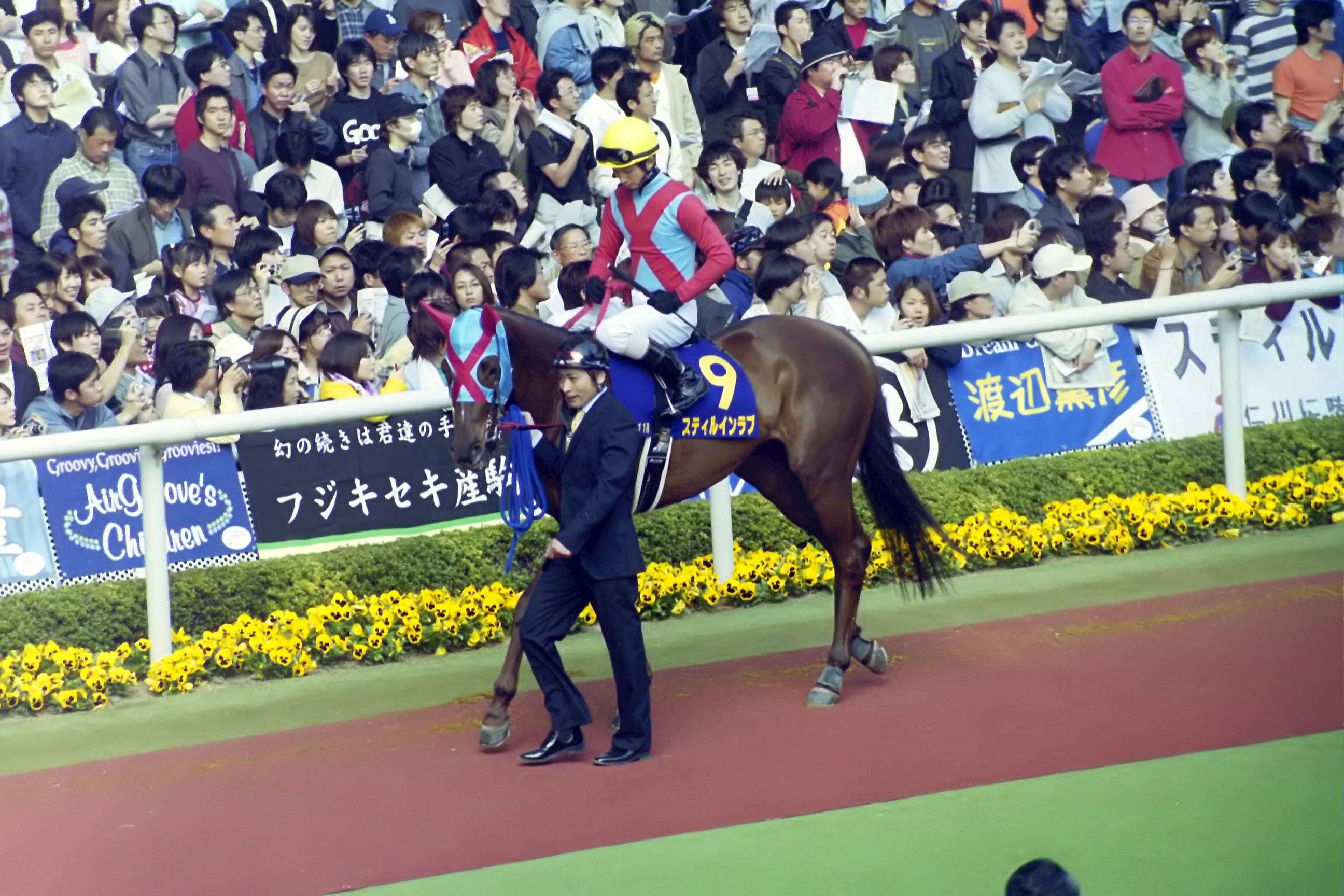 スティルインラブ号